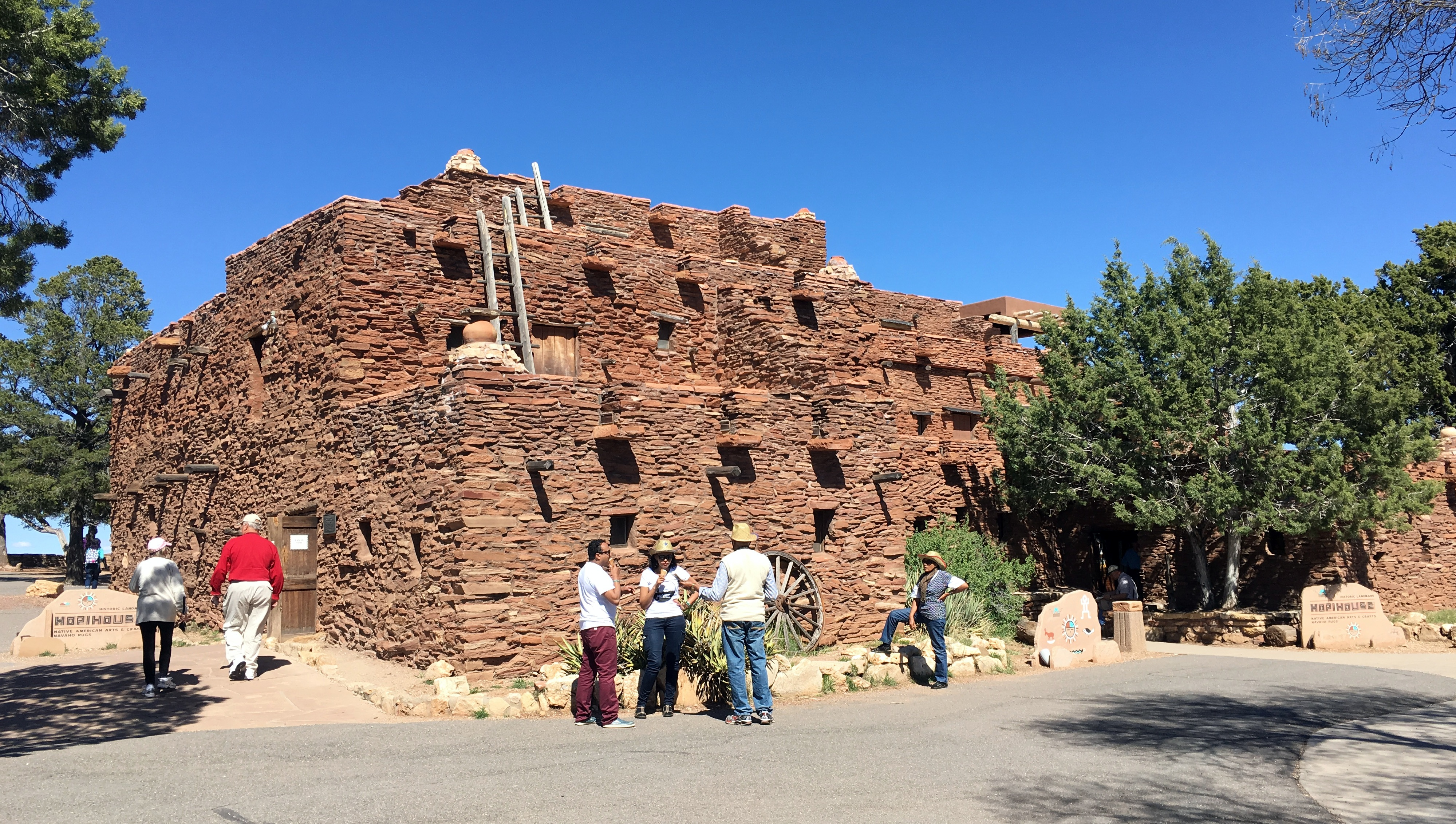 Grand Canyon National Park, Arizona.